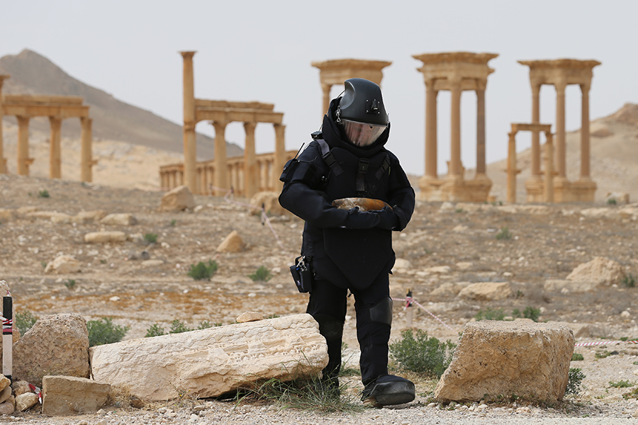 Работа зарубежных СМИ в Пальмире (Сирийская Арабская Республика)